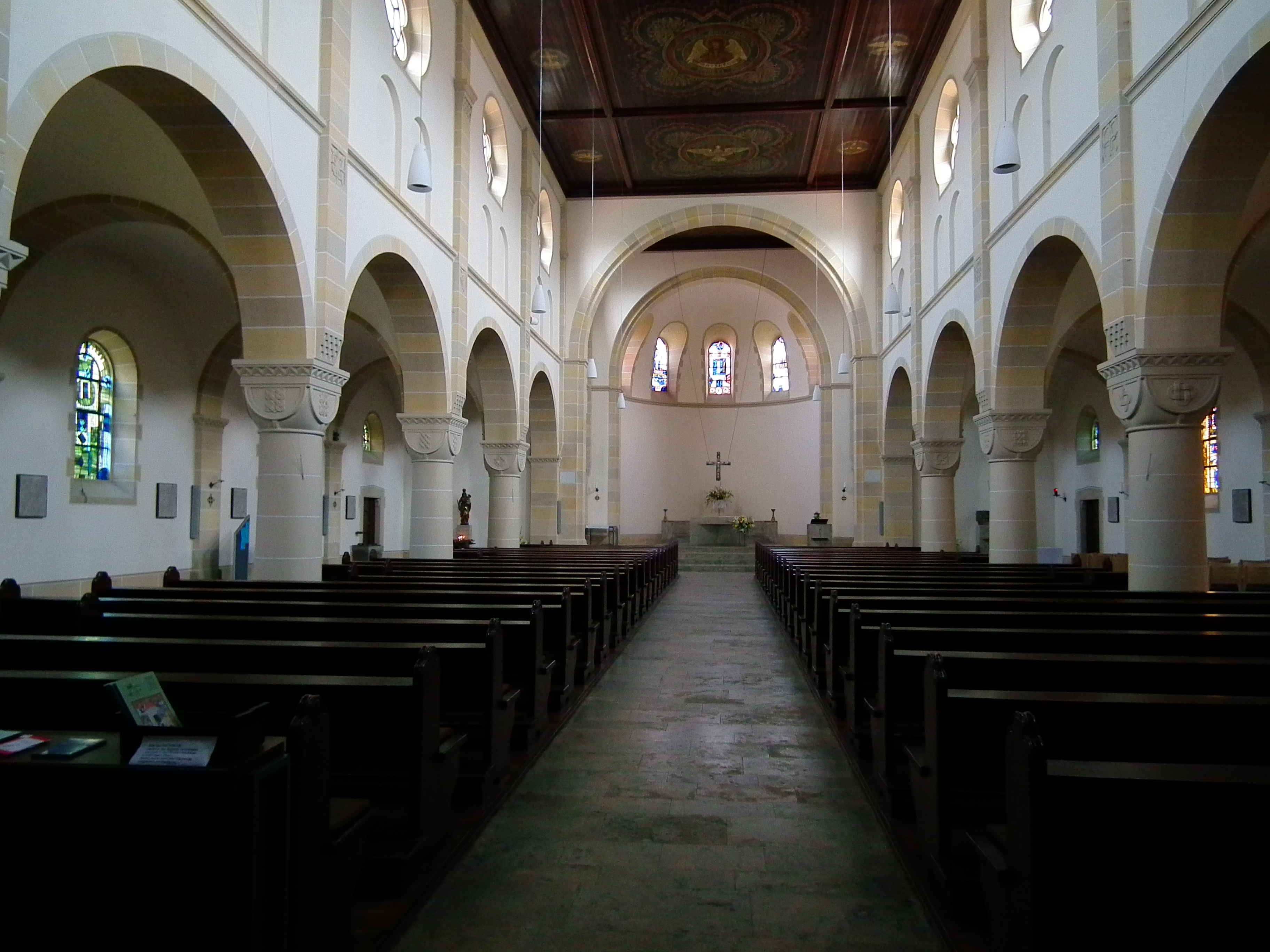 Katholische Kirche St. Peter im Heidelberger Stadtteil Kirchheim (Baden-Württemberg, Deutschland)